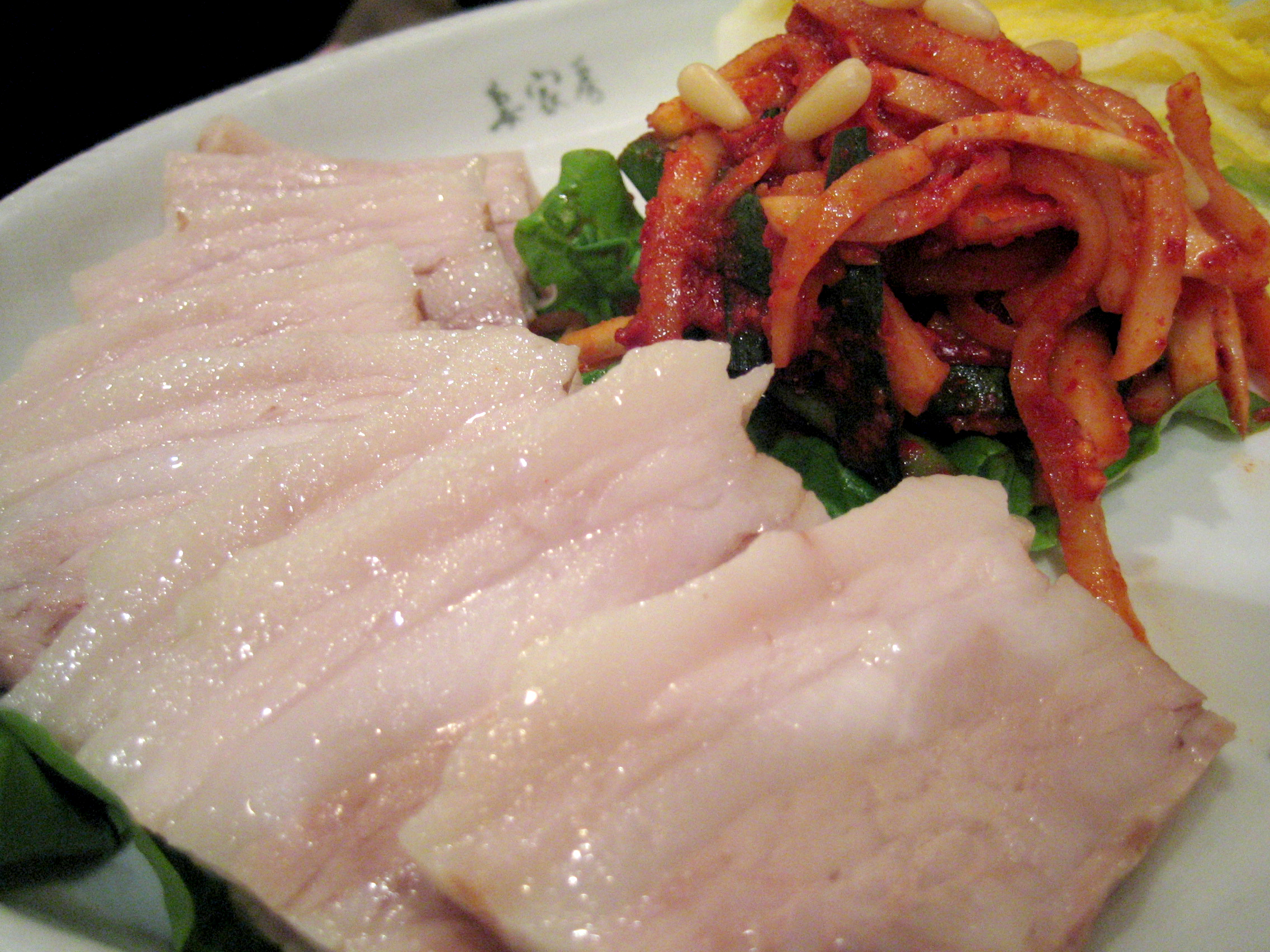 보쌈